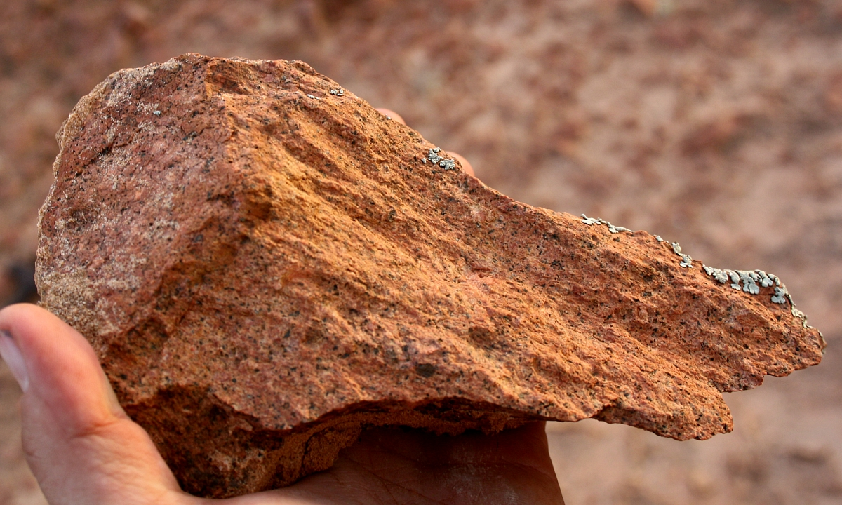 Strahlenkegel (shatter cone) im Yardea-Dazit vom Acraman-Krater